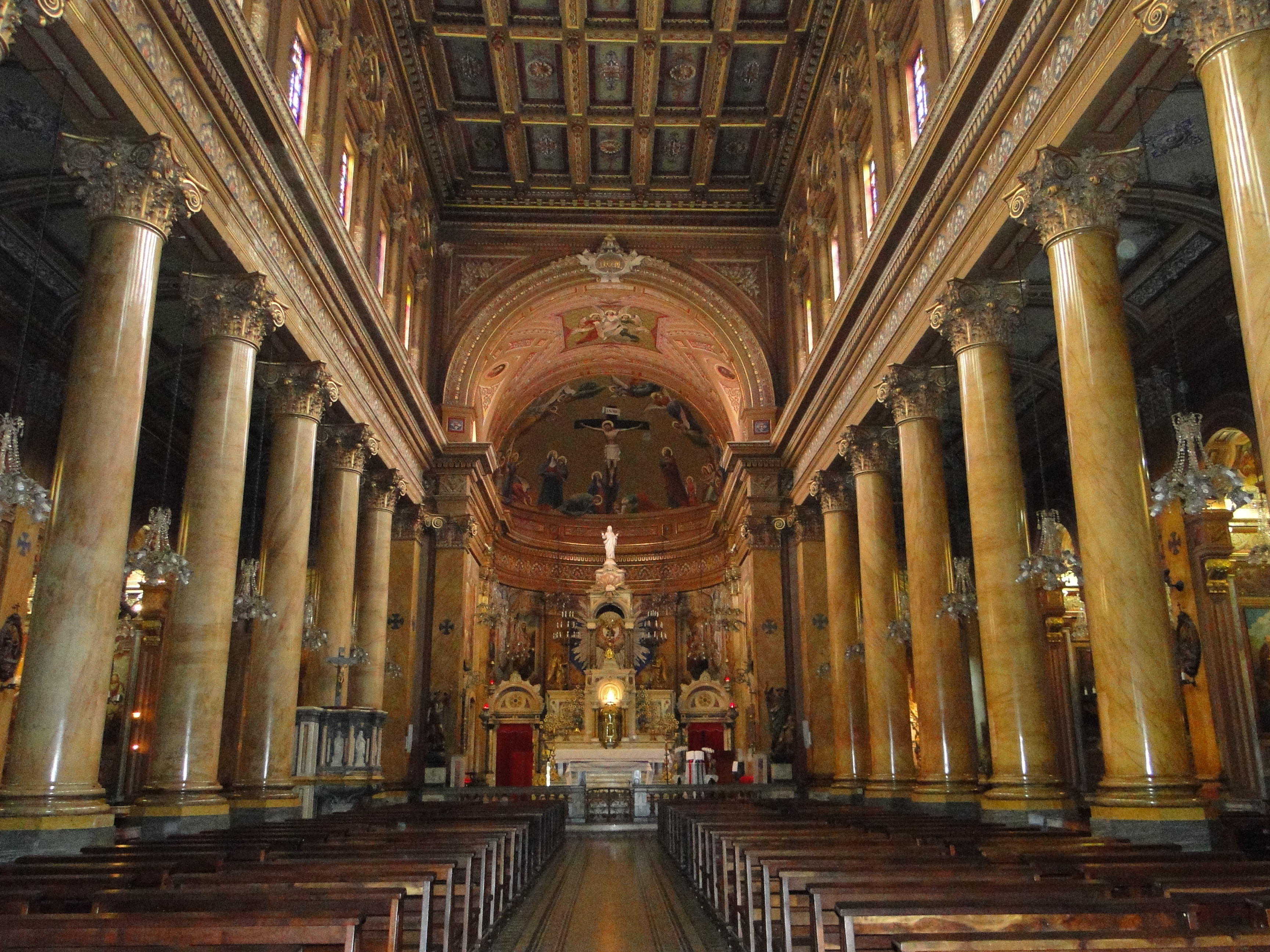 Visão da nave central do Santuário do Sagrado Coração de Jesus a partir de sua porta de entrada, em São Paulo (SP), Brasil.